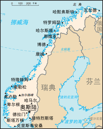 挪威地图。